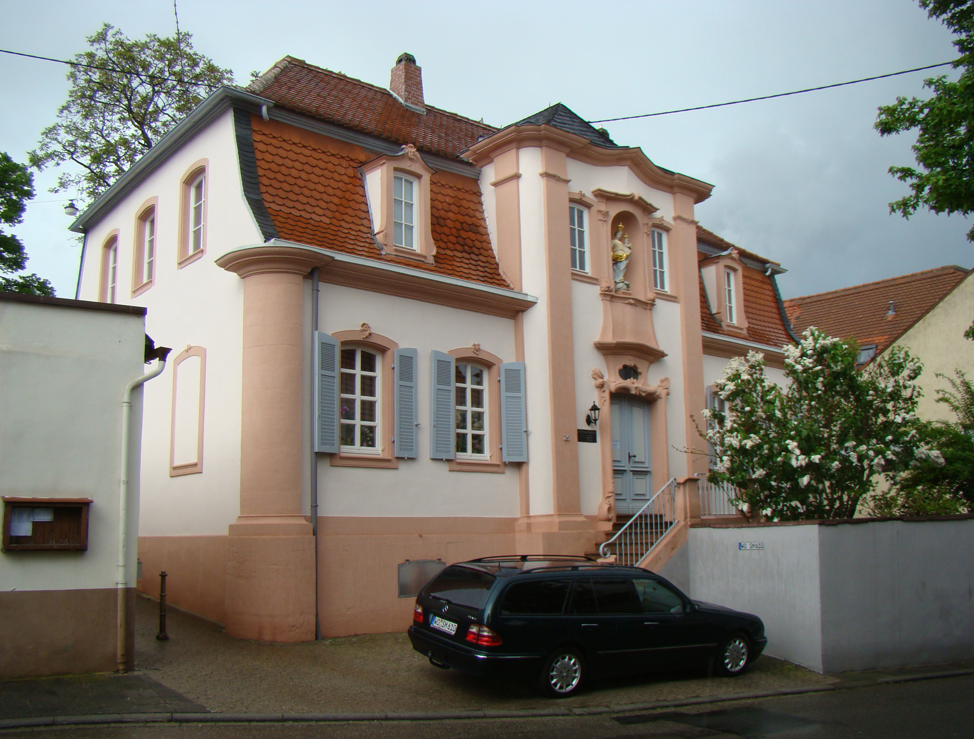 Katholisches Pfarramt in Worms-Pfeddersheim